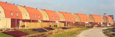 ik heb de foto zelf genomen. dit is een klein stukje van oling.